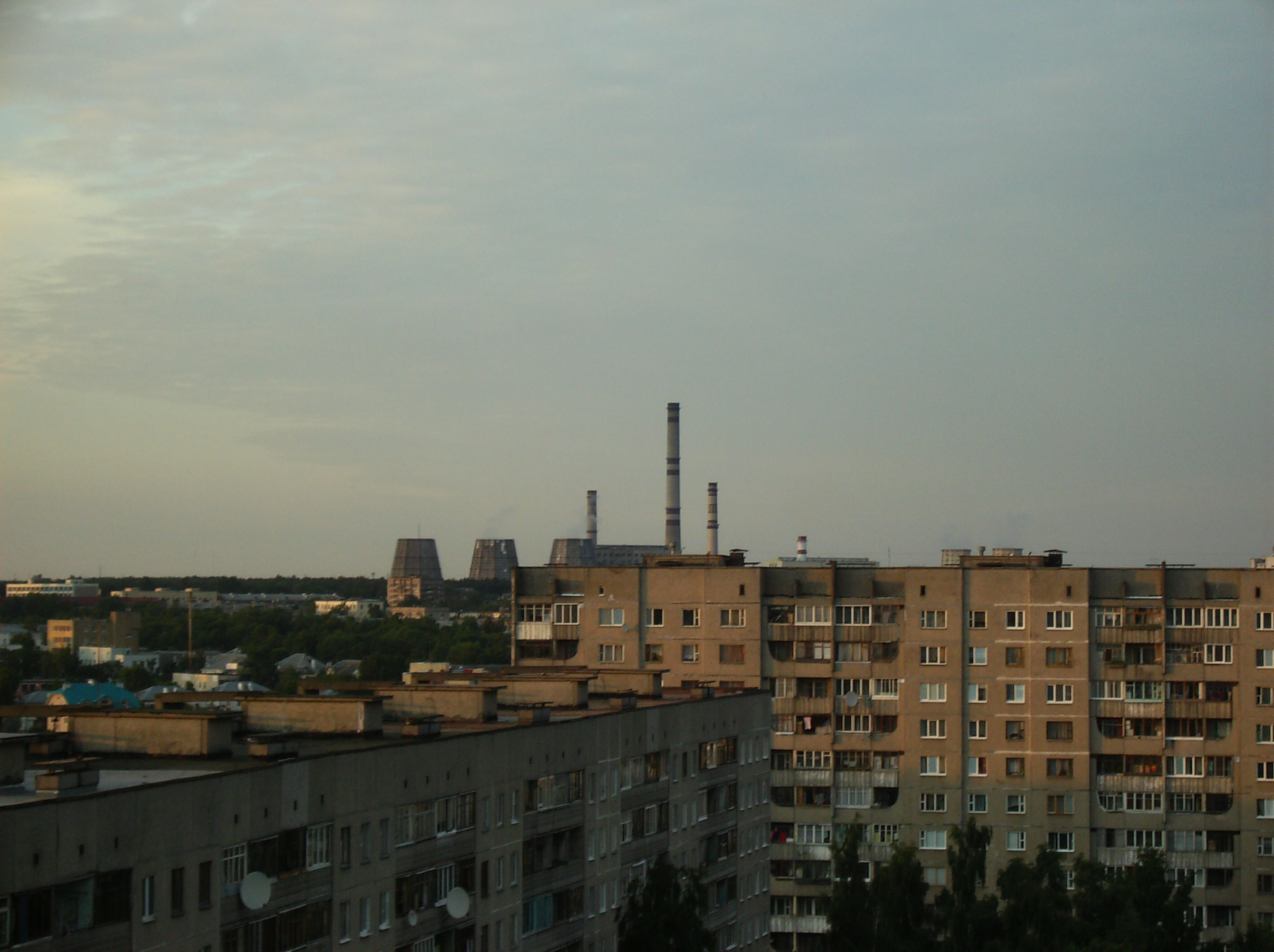 Беларуская (тарашкевіца): Від на ЦЭЦ-3 з боку Серабранкі